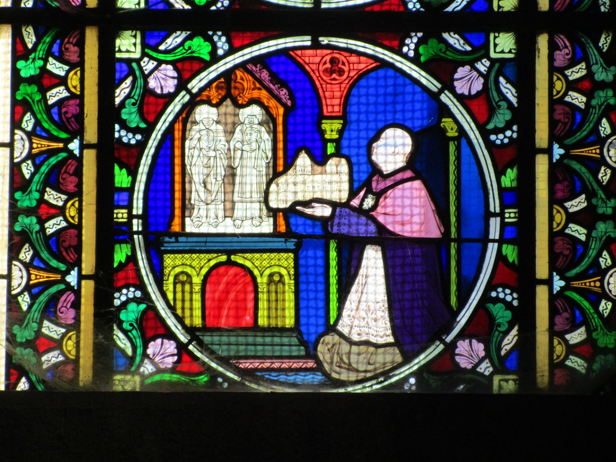 Saint Ferréol et saint Ferjeux de Besançon, Basilique Saint-Ferjeux de Besançon